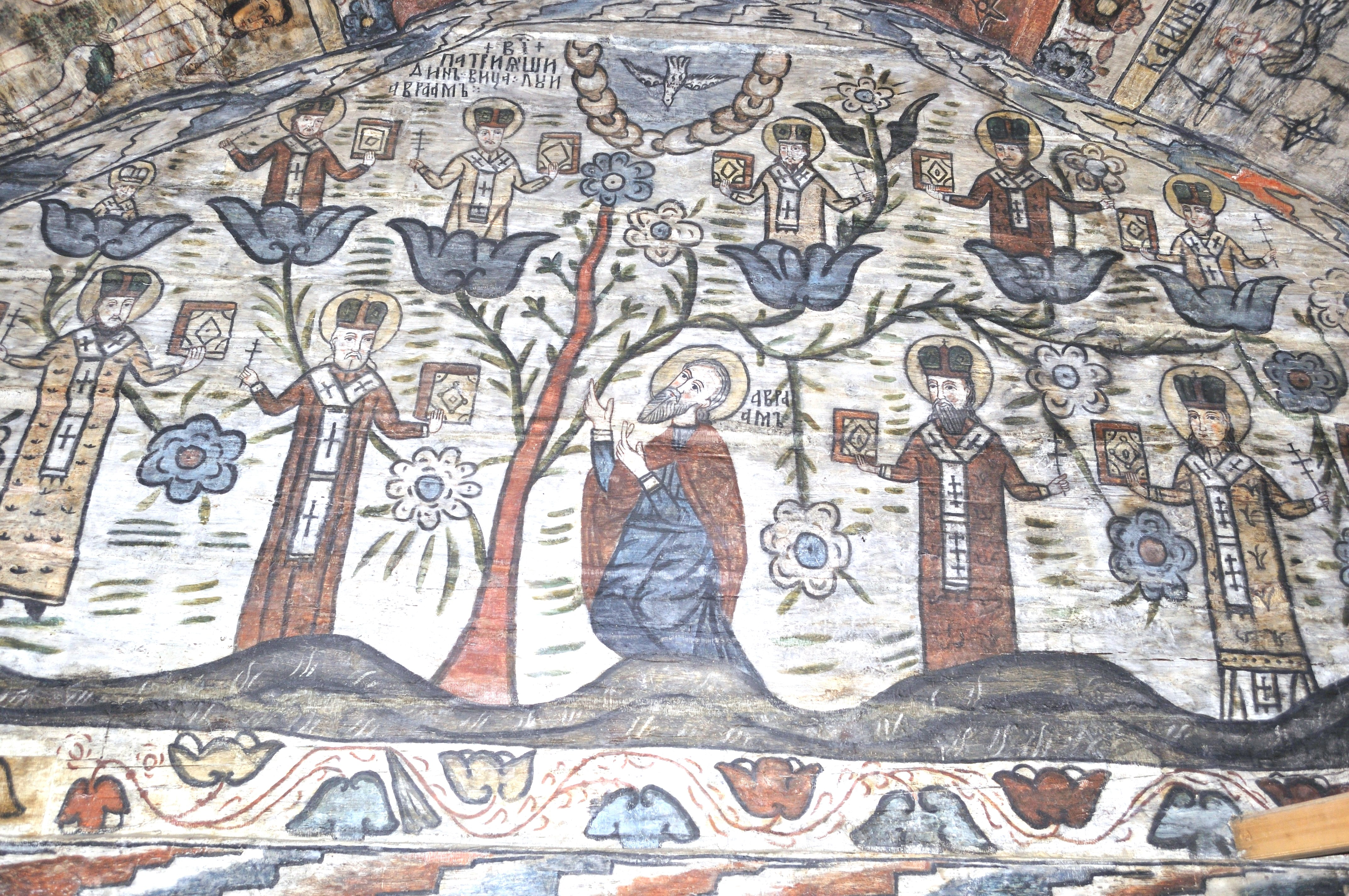 Biserica de lemn „Cuvioasa Paraschiva" din Desești, județul Maramureș